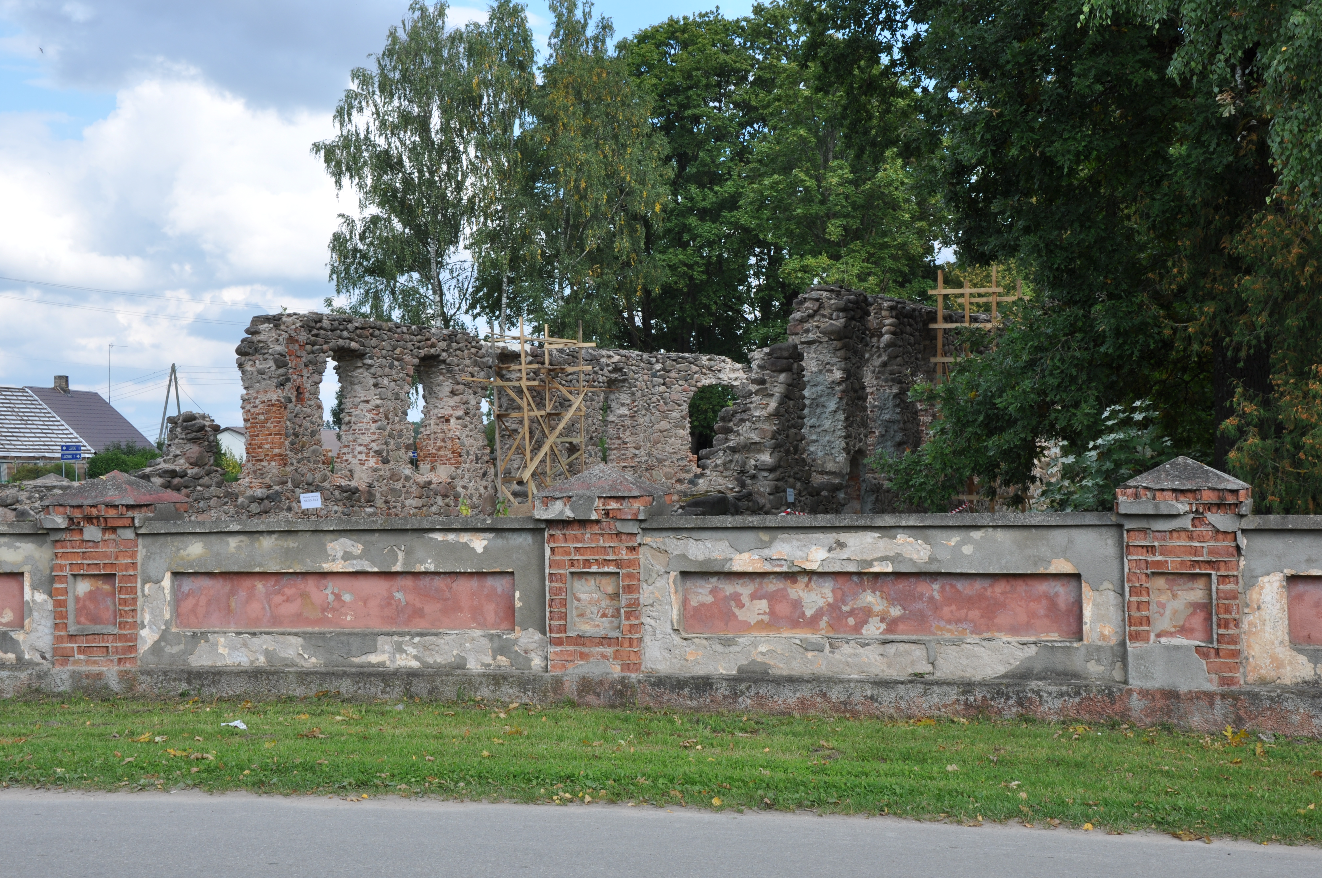 Džūkstes baznīcas drupas, Džūkste, Džūkstes pagasts, Tukuma novads, Latvia.